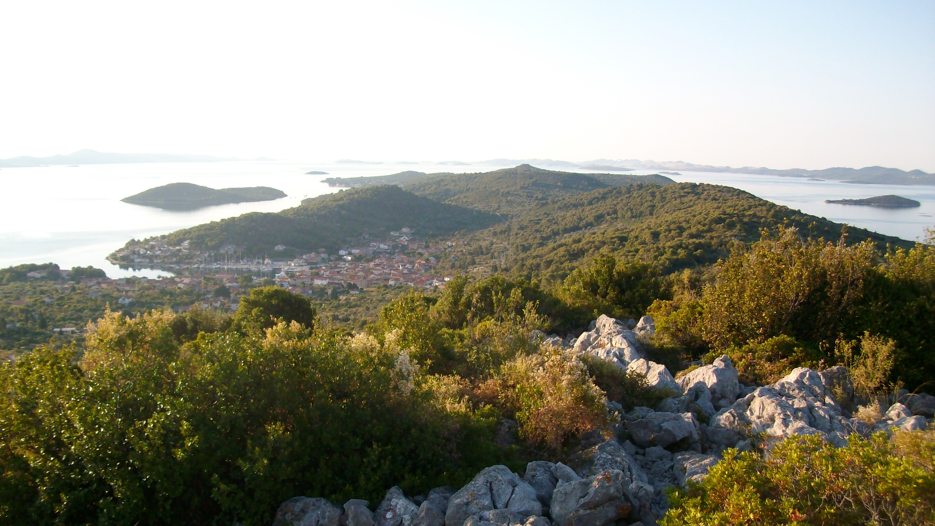 Veli Iz, Kroatien